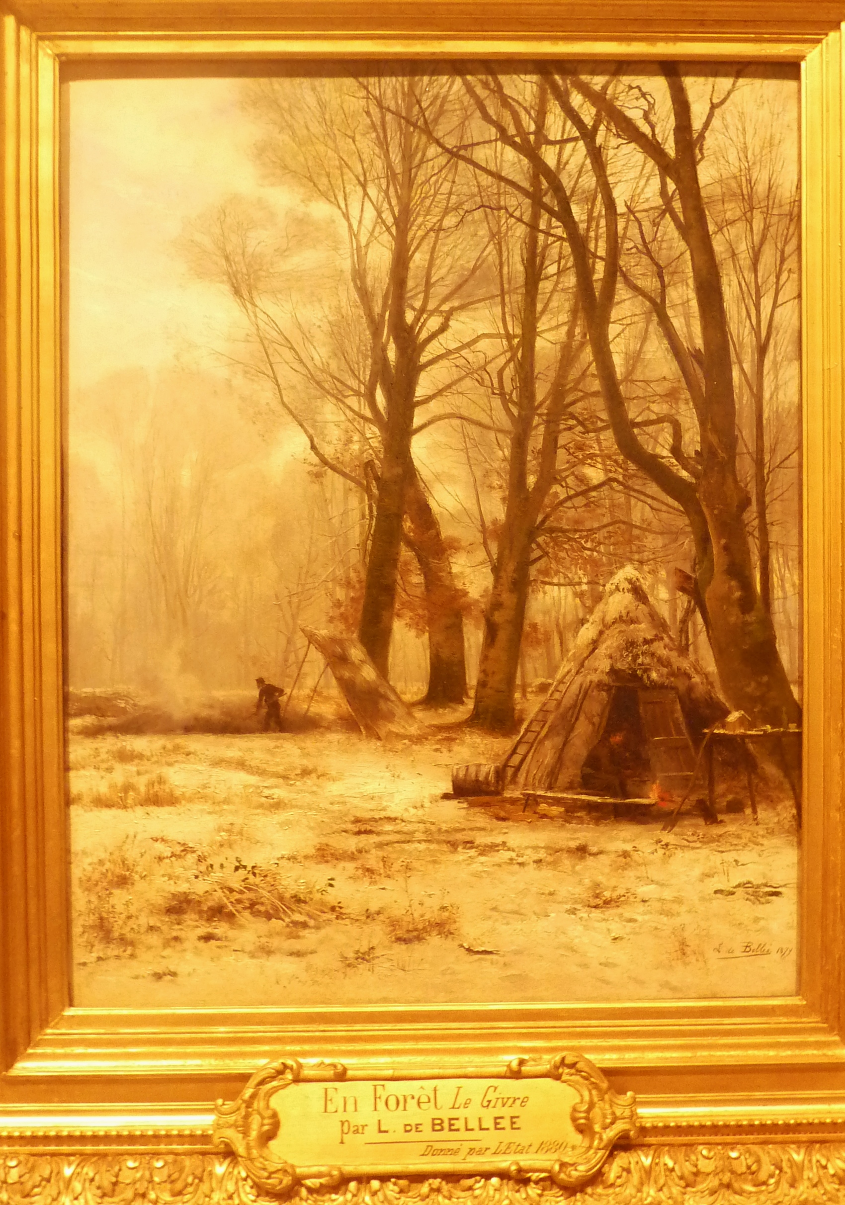 Léon Le Goaebe de Bellée (1846-1891) : En forêt, le givre (le tableau représente aussi une hutte de charbonnier) (huile sur bois, 1879, Musée des beaux-arts de Vannes)